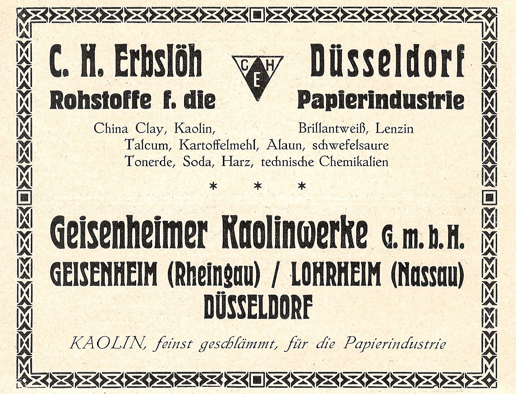 Carl Hugo Erbslöh Düsseldorf, Geisenheimer Kaolinwerke in Geisenheim (Rheingau) und Lohrheim (Nassau). Zeitungswerbung für Rohstoffe zur Papierherstellung aus dem Jahre 1929.